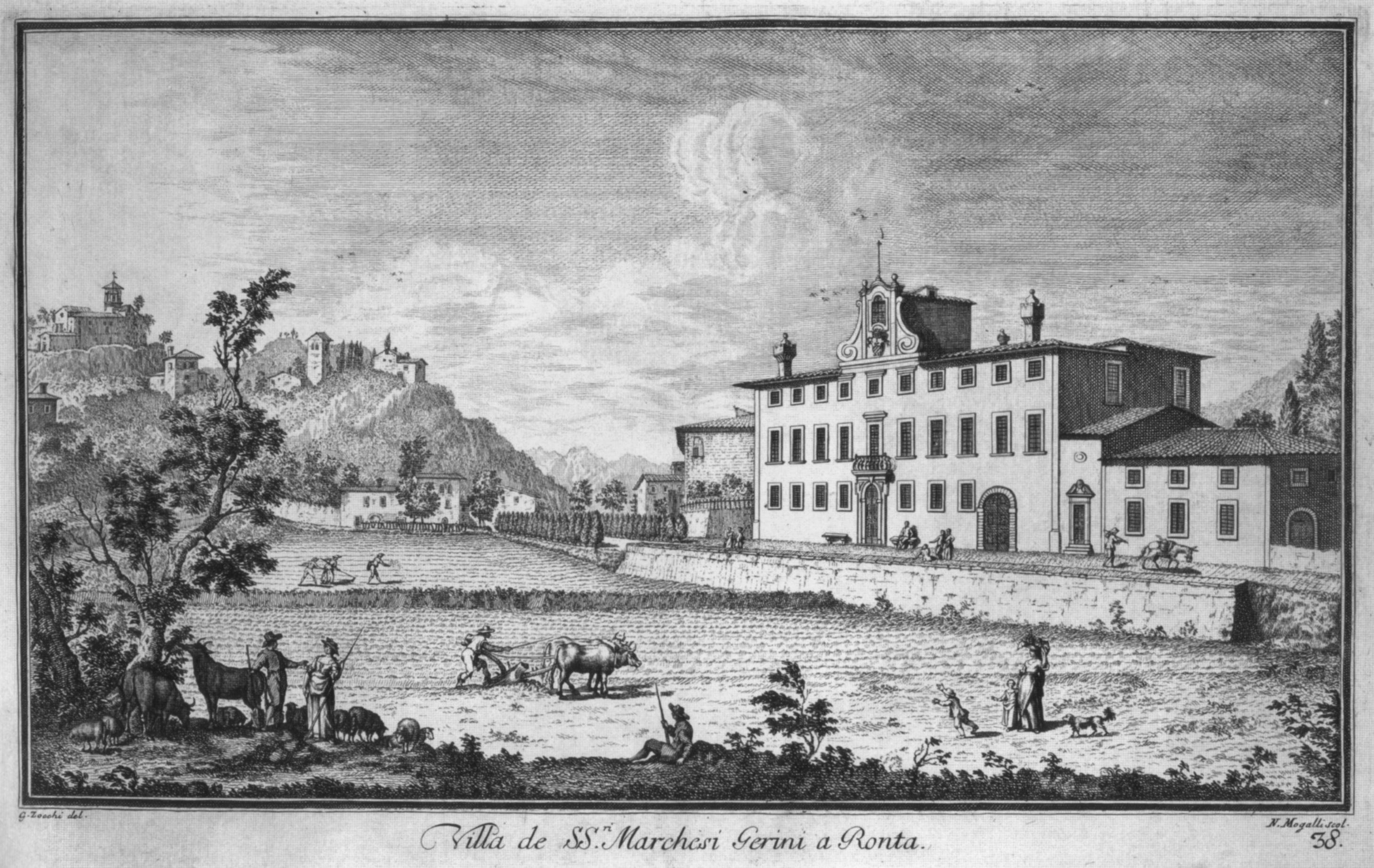 Zocchi, ville 40 ronta